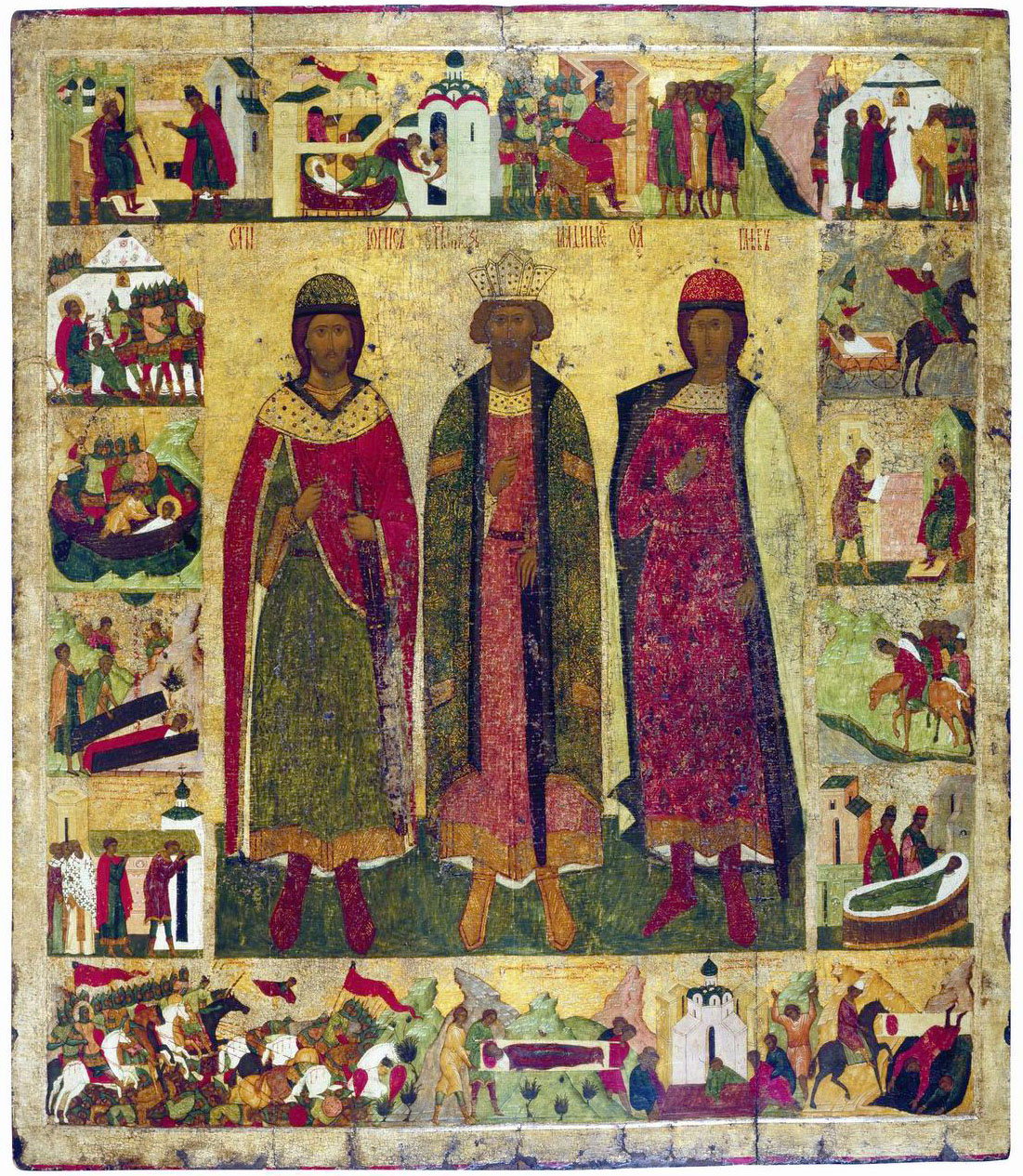 Неизвестный иконописец, XVI век Князья Владимир, Борис и Глеб, с житием Бориса и Глеба Первая четверть XVI века Дерево, темпера 138 х 120 Первые иконы с житийными клеймами появляются в русском искусстве во второй половине XIII века. В XVI веке житийные иконы получают особенно широкое распространение. В среднике изображены князь Владимир в царской короне и его младшие сыновья Борис и Глеб. Средник окружают шестнадцать клейм: 1 2 3 4 5 6 9 7 10 8 11 2 13 14 15 16 1. Князь Владимир вручает меч Борису и отправляет его на войну с кочевниками-печенегами; 2. Погребение великого Благоверного князя Владимира, умершего в отсутствии сына; 3. Святополк созывает киевлян (?); 4. Борис со слугой Георгием Угрином молятся в шатре, предчувствуя несчастье; 5. Георгий Угрин пытается защитить князя Бориса, когда убийцы врываются в шатер; 6. Убийство князя Бориса, тело Бориса везут в Киев; 7. Святополк посылает слугу к Глебу с известием о болезни отца; 8. Князь Глеб едет в Киев, конь под ним споткнулся; 9. Убийство Глеба в ладье; 10. Тело князя Глеба кладут между двумя колодами; 11. Перенесение мощей князей Бориса и Глеба в Вышгород; 12. Явление князей Бориса и Глеба монаху Мартину; 13. Битва Ярослава с войском Святополка окаянного; 14. Больного князя Мстислава Черниговского несут ко гробу князей Бориса и Глеба для исцеления; 15. Чудеса от мощей князей Бориса и Глеба; 16. Гибель Святополка Окаянного. Литературной основой для житийных клейм является «Чтение о житии и погублении... страстотерпцев Бориса и Глеба» конца XI века. В более позднее время житие князей Бориса и Глеба дополнялось новыми подробностями, что нашло отражение в иконе включением клейма об исцелении князя Мстислава (клеймо 14).